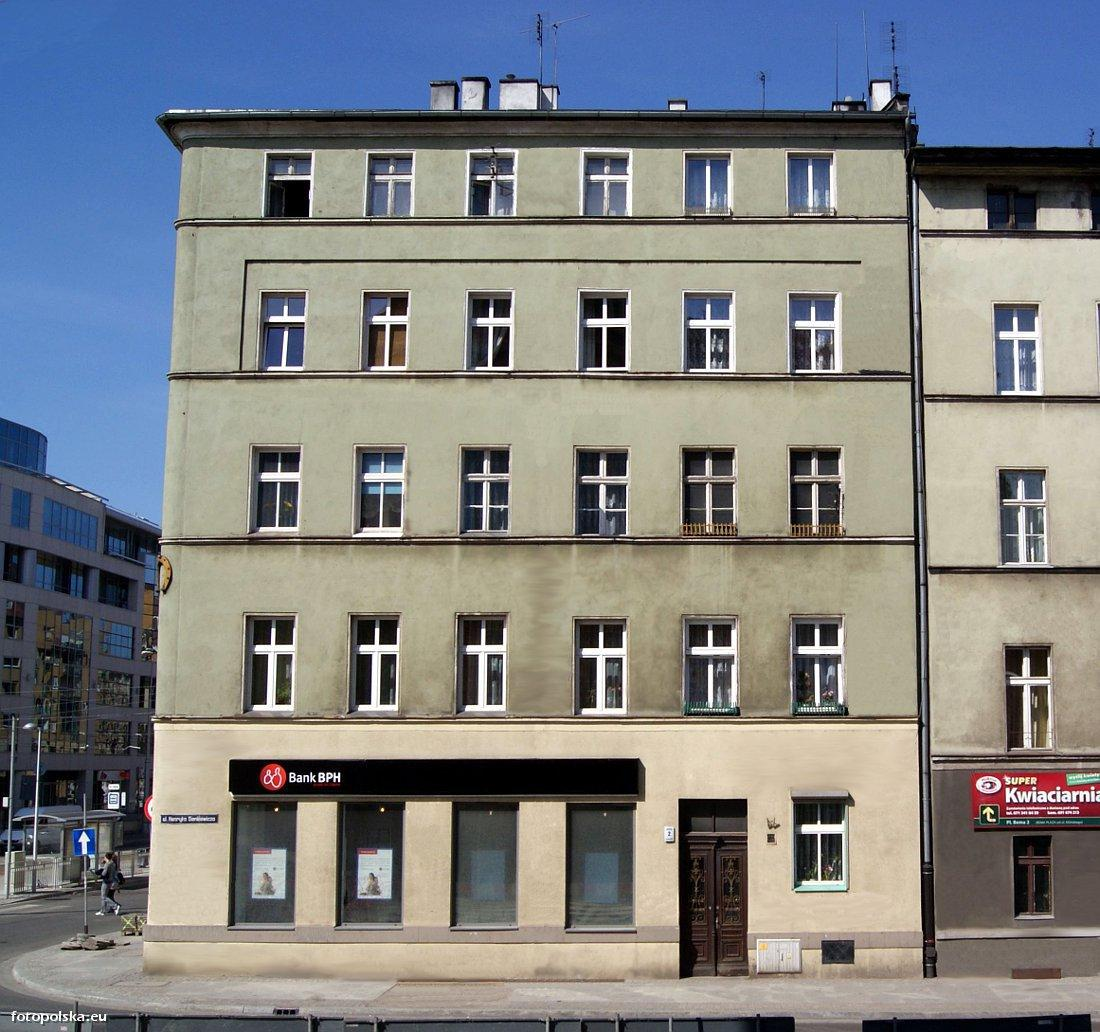 Dom Pod Niebieską Podkową - ul. Sienkiewicza 2.